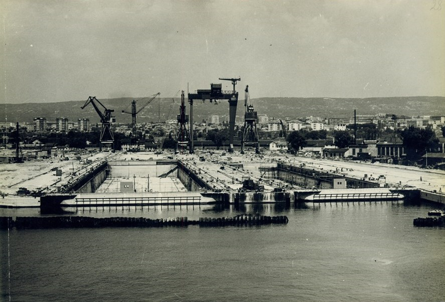 Етап от реконструкцията на корабостроителен завод "Георги Димитров" – Варна, доковите камери са затворени, голямата кера е осушена, виждат се 80 и 500 т. кранове.